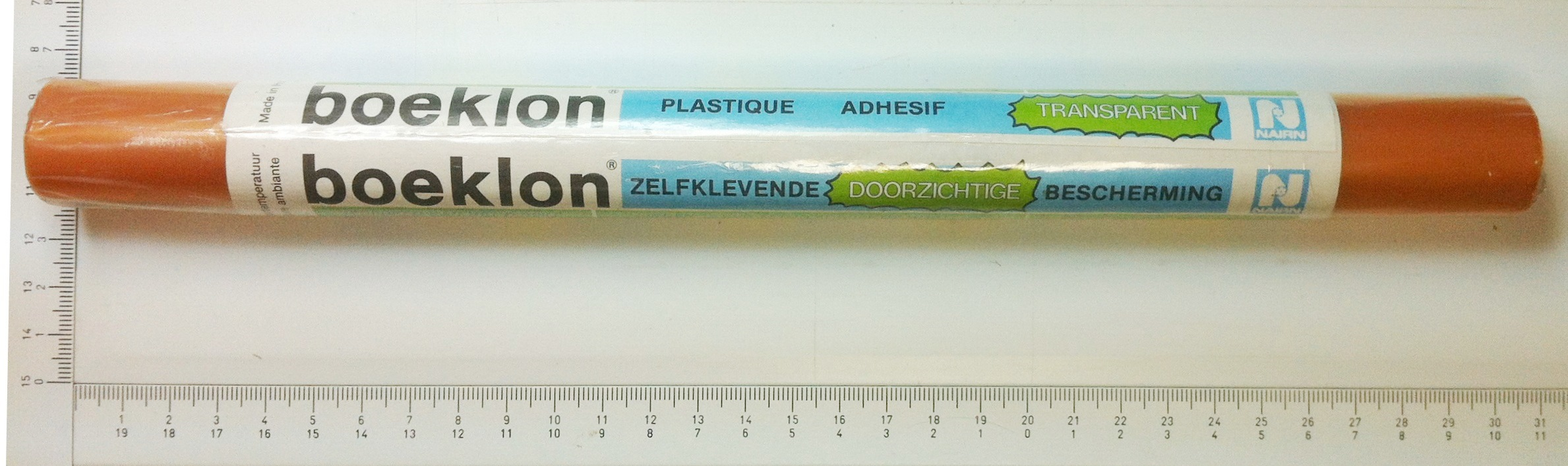 Een rol Boeklon.